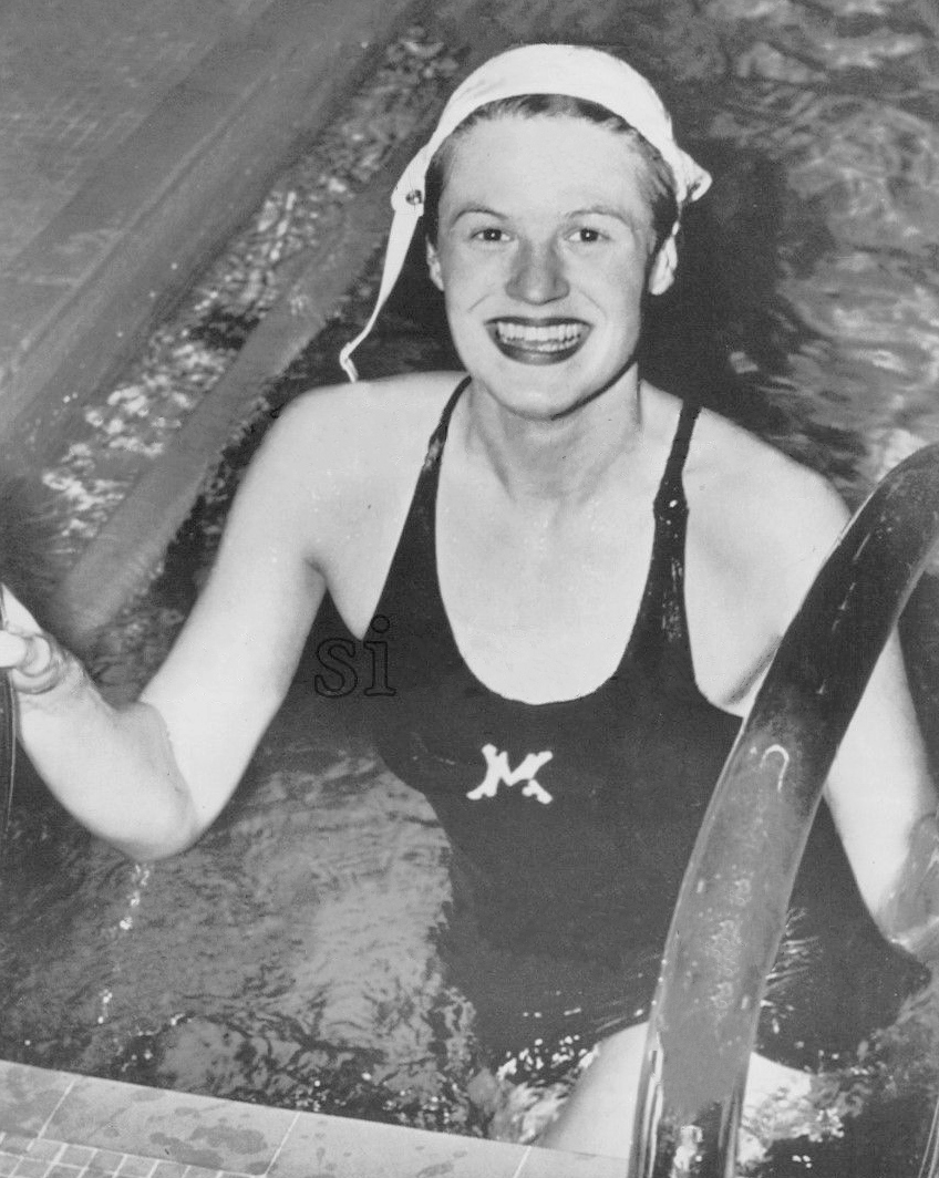 1948 Swimmer Suzanne Zimmerman Edwards Press Photo